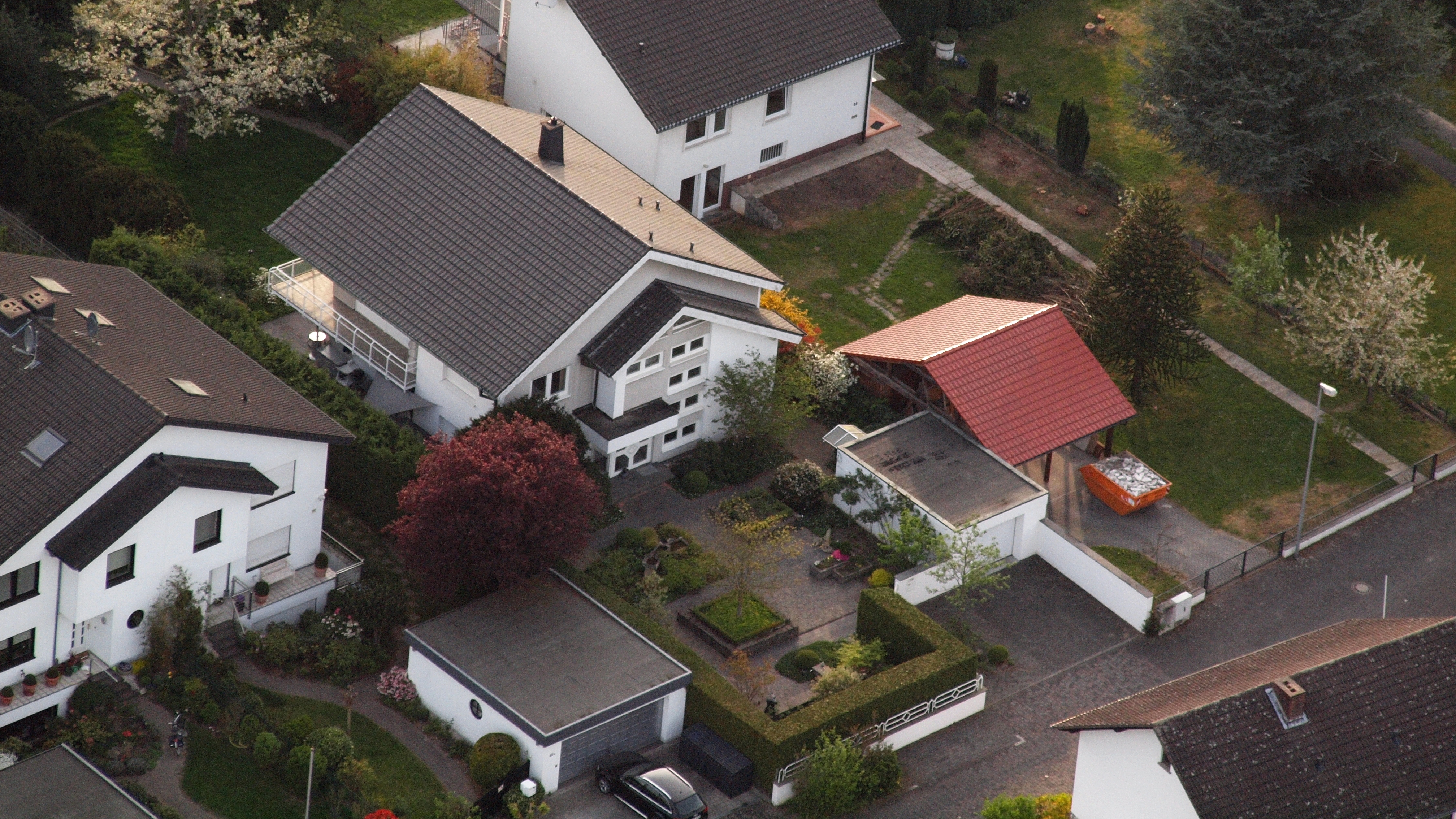 Unkel, Auf dem Rheinbüchel 60, Willy Brandts Wohnhaus (2015); erbaut 1989.